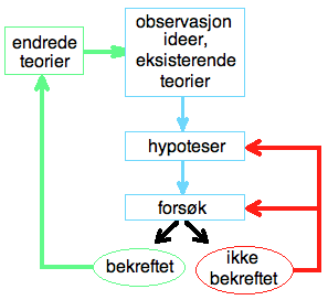 Enkel figur av stegene i den (natur-)vitenskapelige metoden.